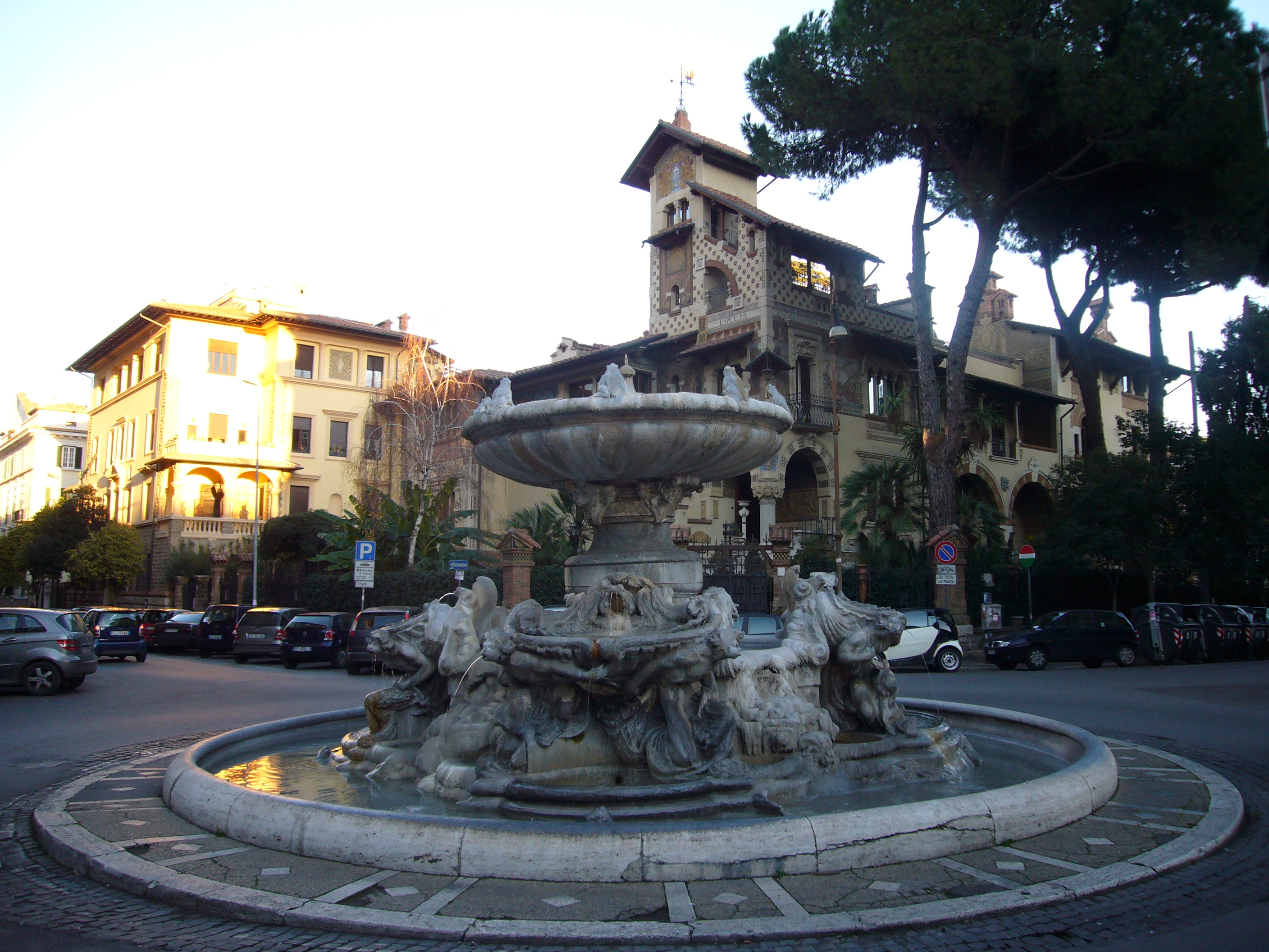 Roma, Quartiere Coppedé: fontana delle rane